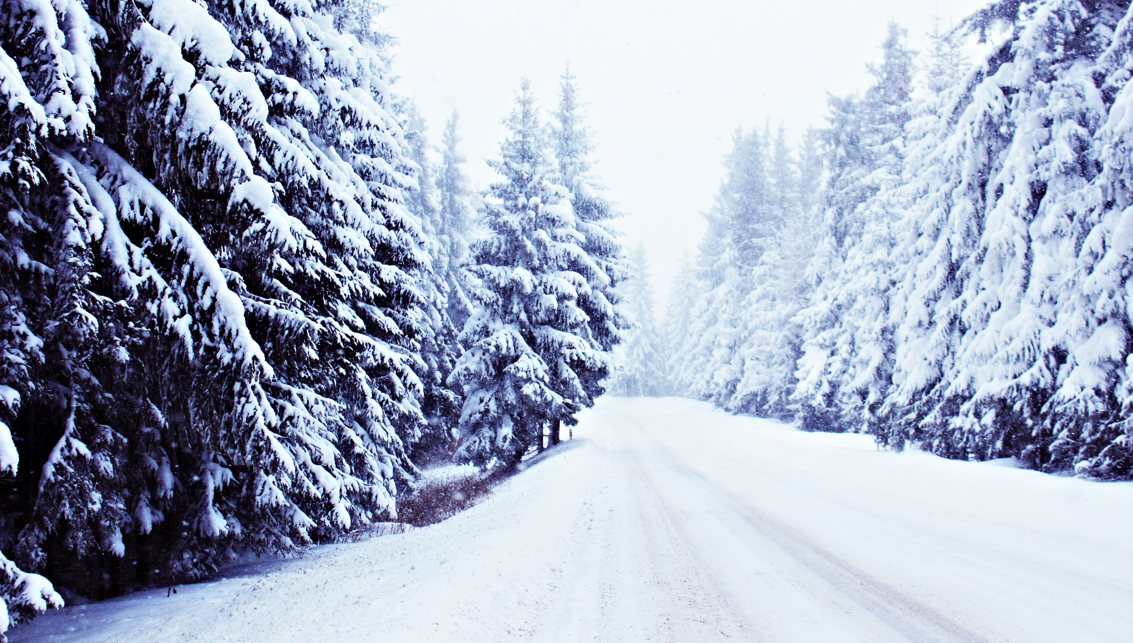 w środku lasu - krajobraz zimowy English | Polski | +/−